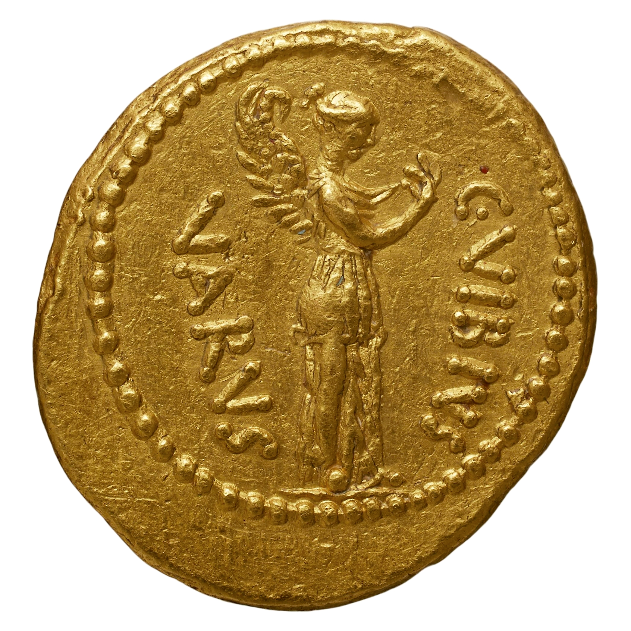 Aureus de Caius Vibius Varus. or, 8,06 gr. Revers : . C VIBIVS / VARVS. Némésis ailée debout à droite, lève le pli de sa robe de la main droite. Rome, 42 av.JC. Collection BnF : REP-21390 - RRC 494/35 – B.25 (Vibia)